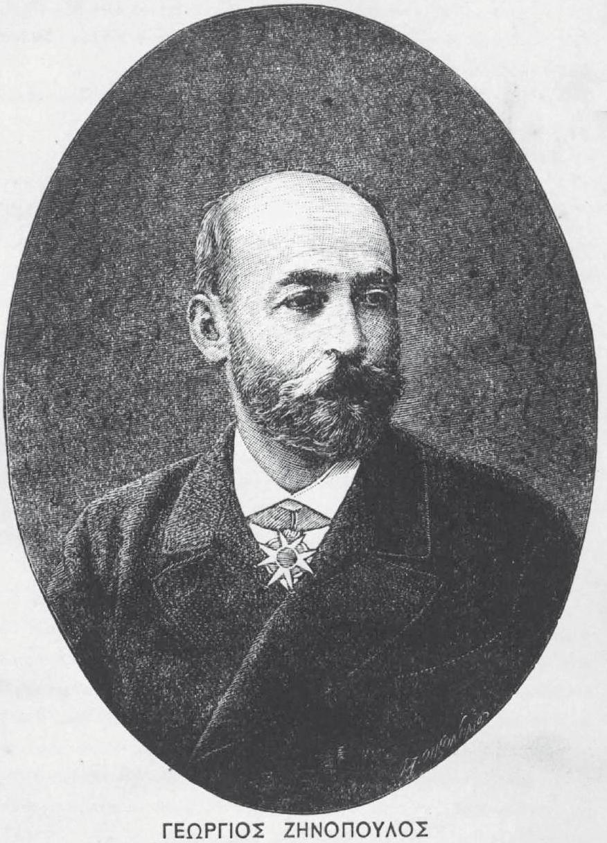 namhafte Griechische Persönlichkeit, 19. Jahrhundert